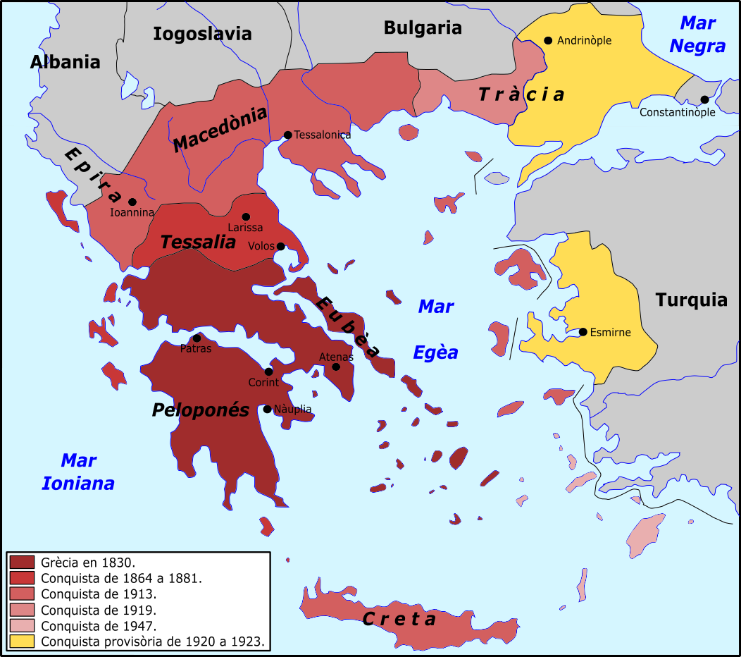 Chi-Chewa: Evolucions territòrialas de Grècia.